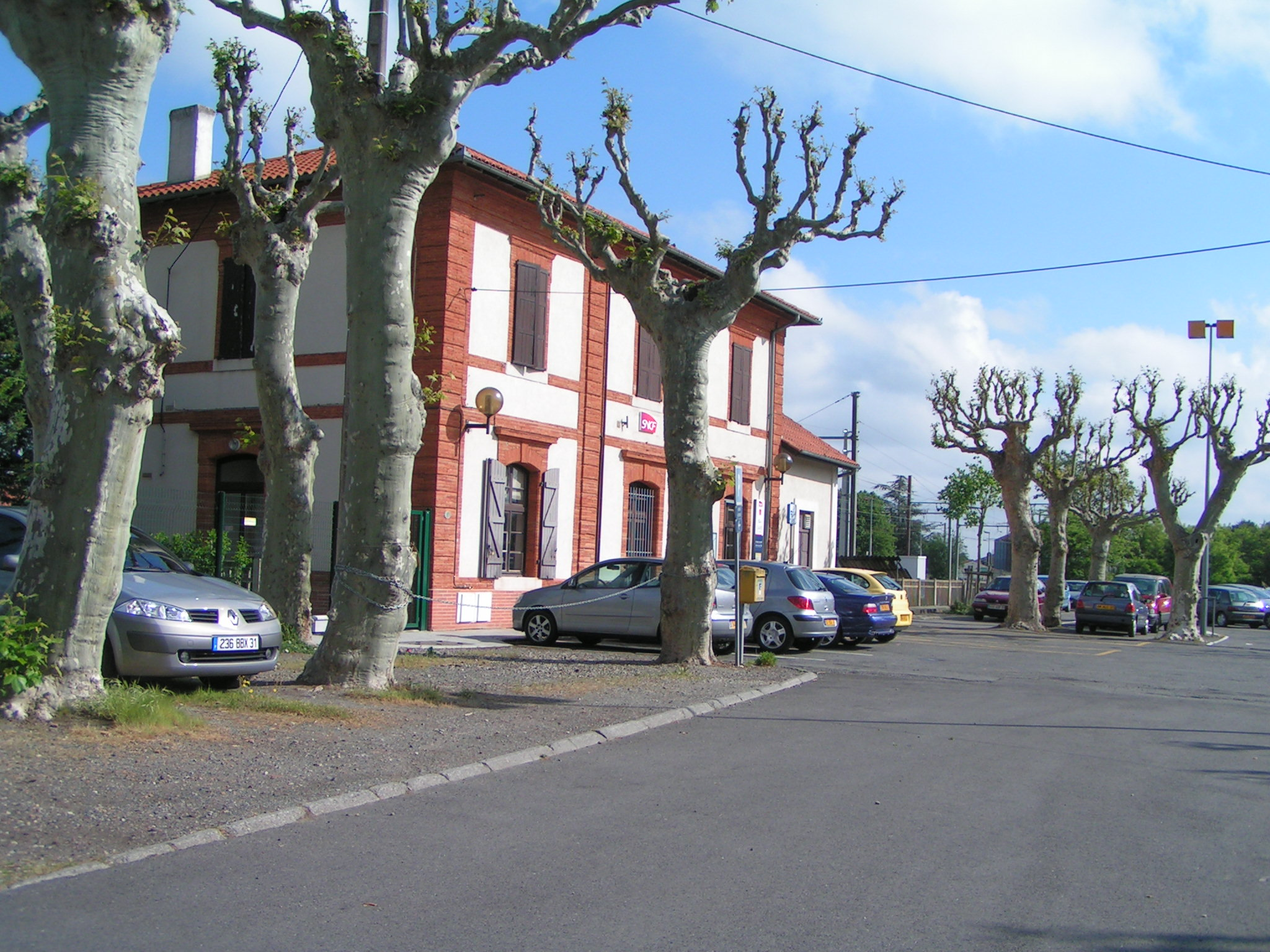 Gare de Carbonne (Haute-Garonne, France).